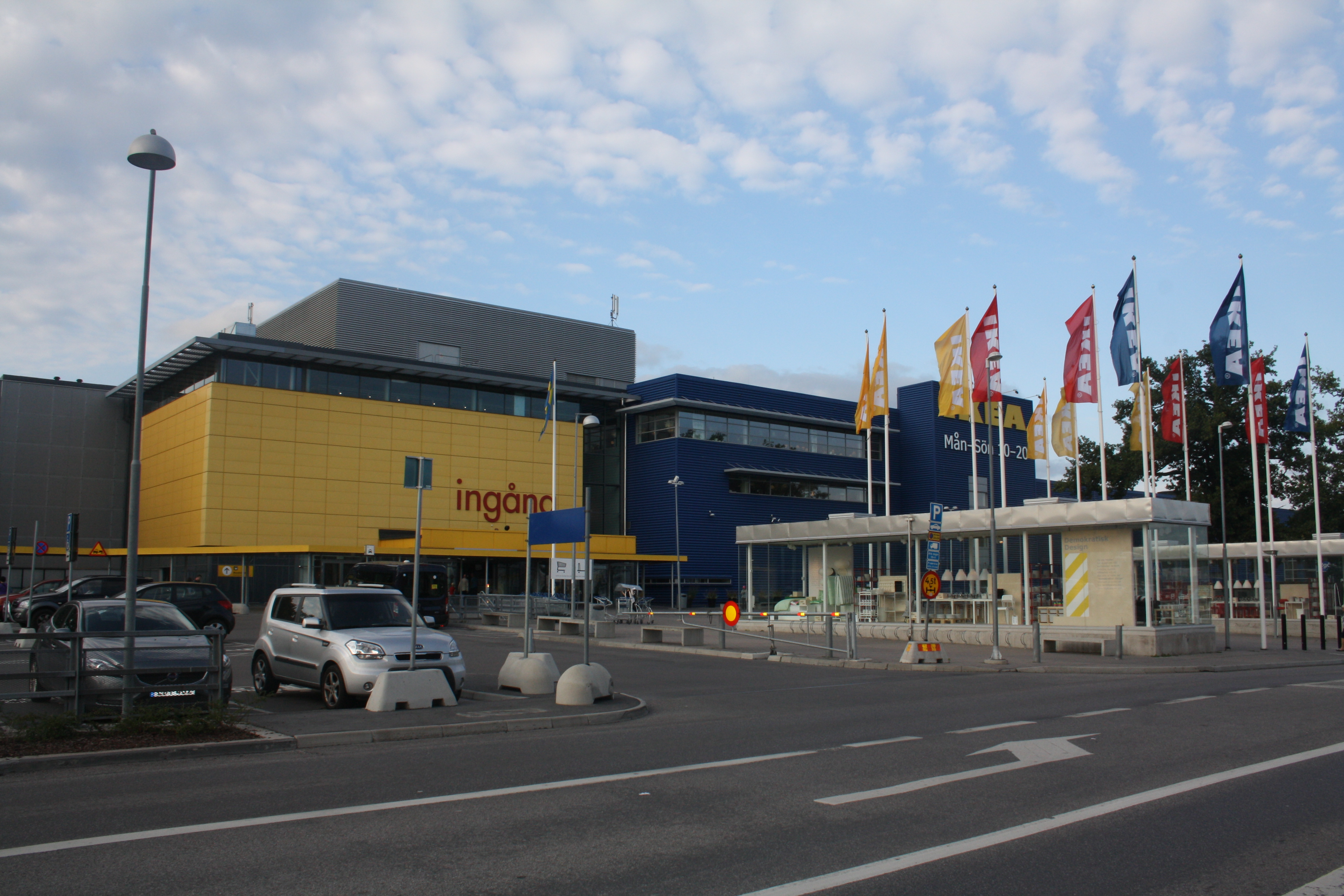 IKEA i Kungens Kurva september 2016